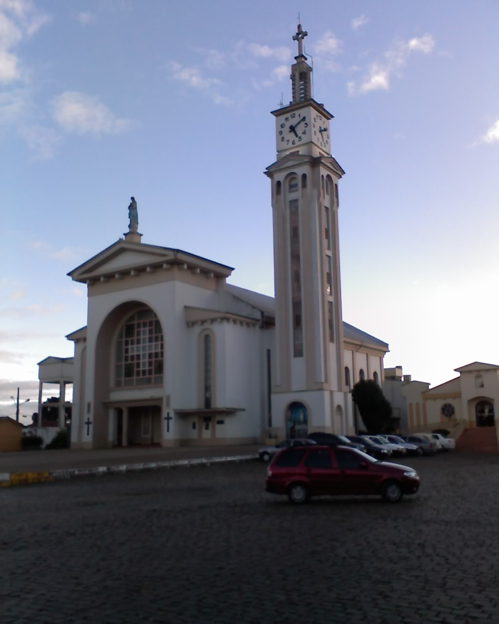 Igreja Matriz, no centro da cidade de Curitibanos no estado de Santa Catarina(Brasil).